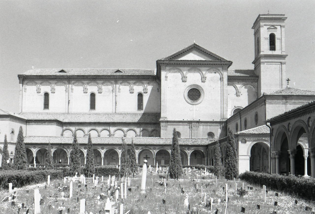 Servizio fotografico : Ferrara, 1969 / Paolo Monti. - Strisce: 7, Fotogrammi complessivi: 37 : Negativo b/n, gelatina bromuro d'argento/ pellicola ; 35 mm. - ((I fotogrammi hanno una doppia numerazione. . - Sul portanegativi: Nikon FP4. - Sul dorso del portanegativi Monti specifica: "seguito 708". - Occasione: Documentazione per la pubblicaizone di: "Renzo RENZI (a cura di), Ferrara, Bologna, Edizioni Alfa, 1969". - Fonte: Agenda di Paolo Monti: Monti/ 3 aprile 1966 - 9 marzo 1971/ 12421-16823 (1966-1971), presso Archivio Paolo Monti. - Fonte: Monografia di Renzi, Renzo: Ferrara, Bologna, Edizioni Alfa (1969). - Fonte: Agenda di Paolo Monti: Monti - Agenda 1969 (1969), presso Archivio Paolo Monti